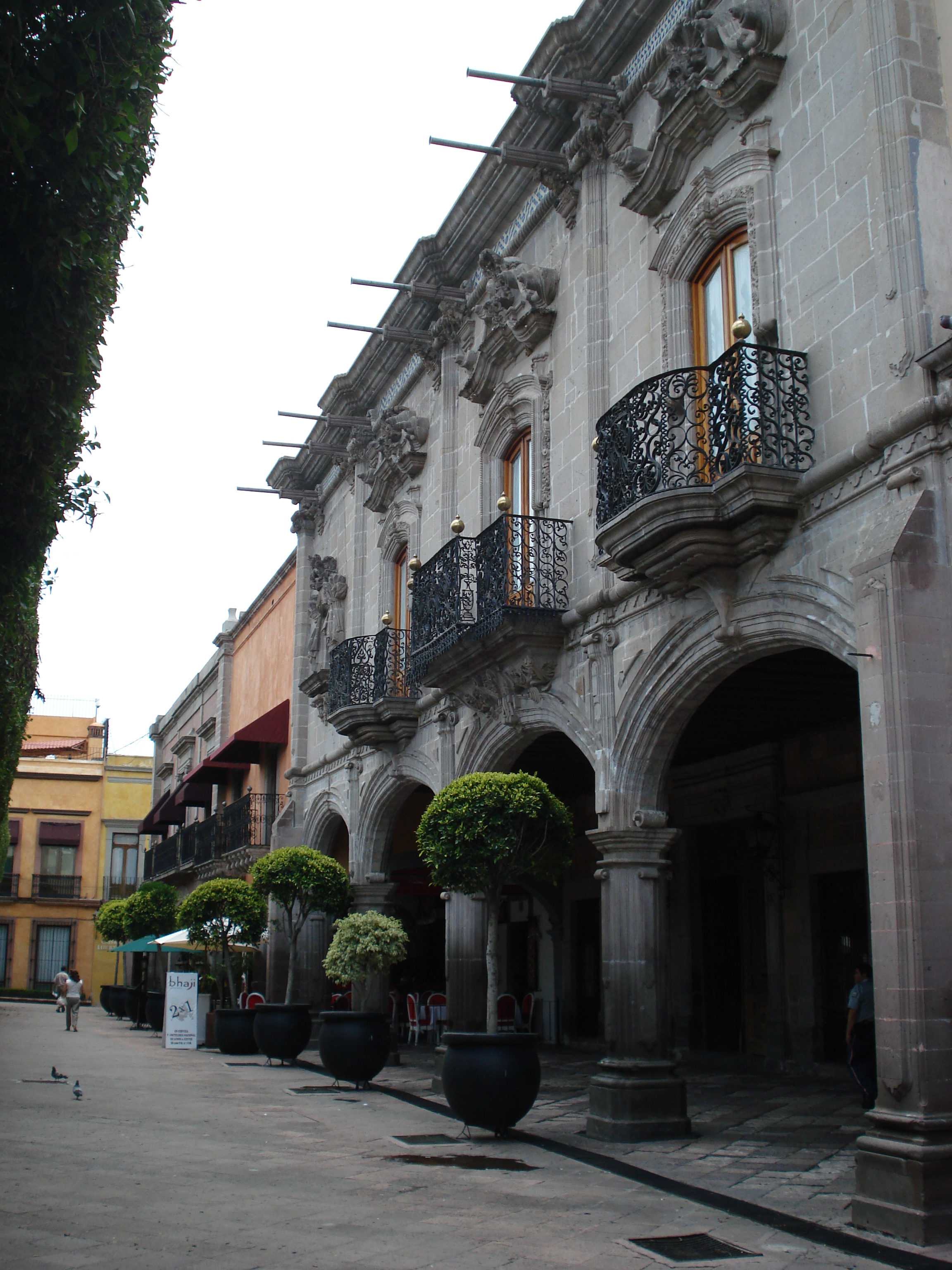 Casa Ecala